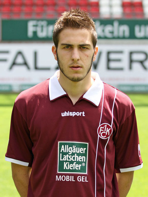 Konstantinos Fortounis, Fußballspieler